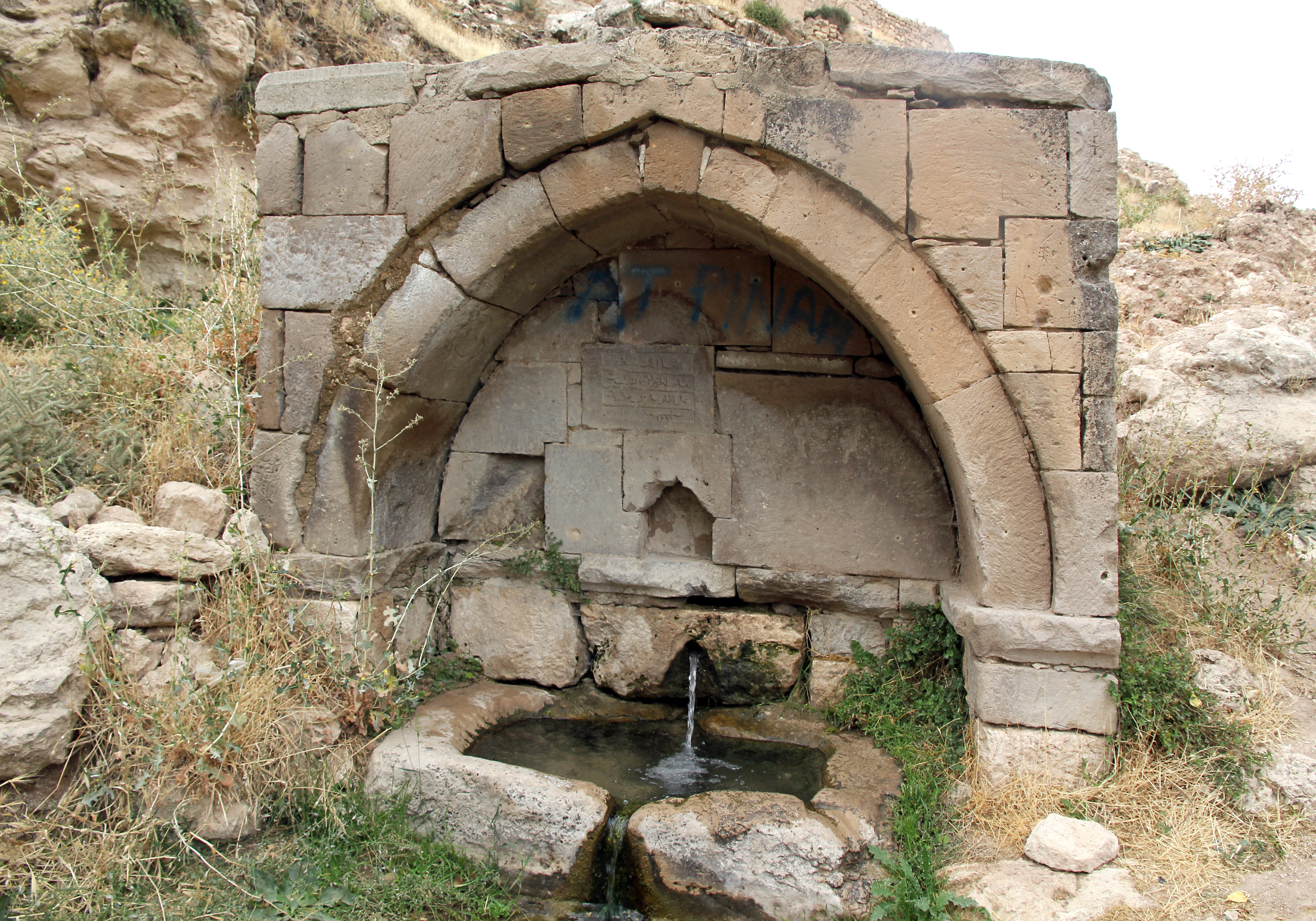 Brunnen in Gökbez in der südtürkischen Provinz Niğde